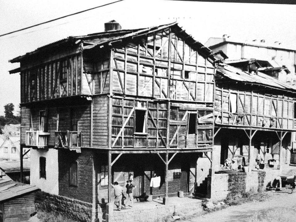 Imagen Antigua del Pabellón83 This is a photo of a national monument in Chile: 2135